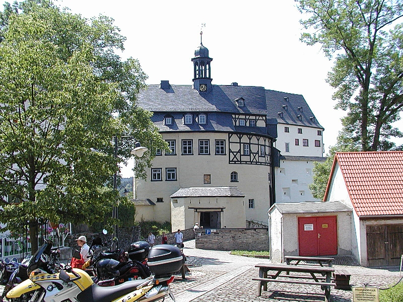 Bilder aus dem Vogtland